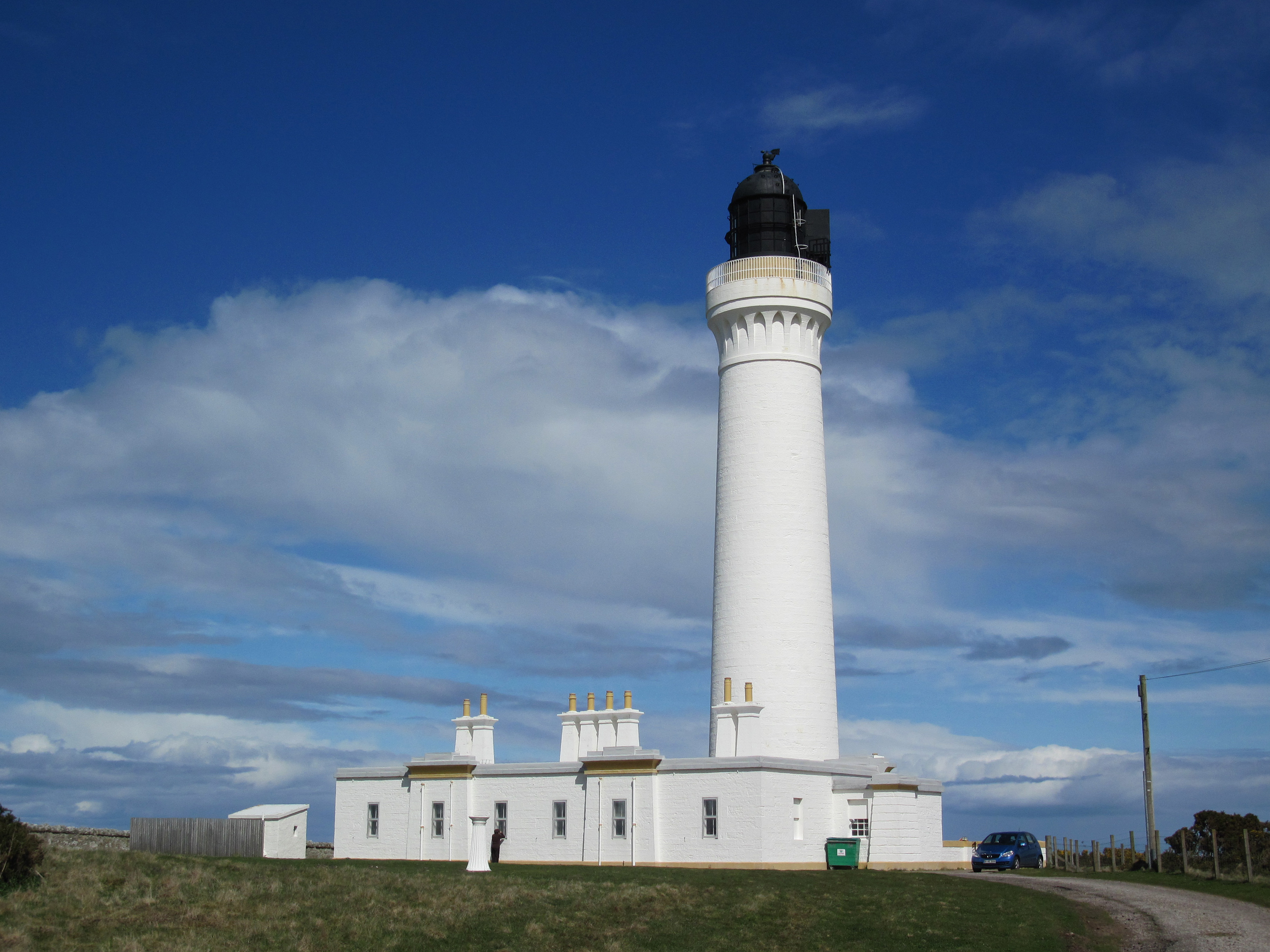 Covesea Lighthouse; Leuchtturmvon Lossiemouth Das Covesea Lighthouse von Lossiemouth ist 36 Meter hoch, der Leuchtturm wurde im Jahre 1844 von Alan Stevenson errichtet. Es handelt sich um einen von vier Leuchttürmen mit insgesamt neun Wohnungen in Schottland, der über den National Trust for Scotland vermietet werden. Man wohnt natürlich nicht in dem runden Turm, sondern in sehr geräumigen Wohnungen ebenerdig am Fuße. Wir hatten die linke Wohnung, die für sechs Personen ausgelegt war. Es gab drei Schlafzimmer (ein Zimmer davon mit Etagenbett), ein schönes Wohnzimmer mit TV & DVD-Player, ein Esszimmer mit großem stabilen Esstisch, sowie Radio/CD-Standgerät, Küche mit Geschirrspüler, Waschmaschine, großer Kühlgefrierkombination, Badzimmer mit Dusche (Durchlauferhitzer) und Badewanne, Speisekammer, Besenkammer und Kofferversteck. Die Möbel waren aus hochwertigem Vollholz, das Geschirr auf sechs Personen abgezählt, Gläser gab es in großem Mengen in verschiedenen Größen; in der Wohnung waren in allen Räumen Elektroheizöfen. Wir bezahlten pro Woche 400 Pfund, darin war komplett alles enthalten (also auch Strom, Wasser, Endreinigung, Bettwäsche und viele Handtücher). Auf dem befriedeten Grundstück gab es genug Pkw-Abstellplatz. Die zweite Wohnung war deutlich kleiner: zwei Schlafzimmer, Wohn-/Esszimmer und Küche.Noch ein Hinweis: In England und Irland sind alle Steckdosen und alle Anschlüsse von Elektrogeräten mit zusätzlichen Schaltern abgesichert. Wenn der Geschirrspüler oder Herd nicht geht: nicht verzweifeln, sondern Schalter suchen. Dieser versteckt sich auch gerne in einem Schrank oder neben der Zimmerabschlusstür.